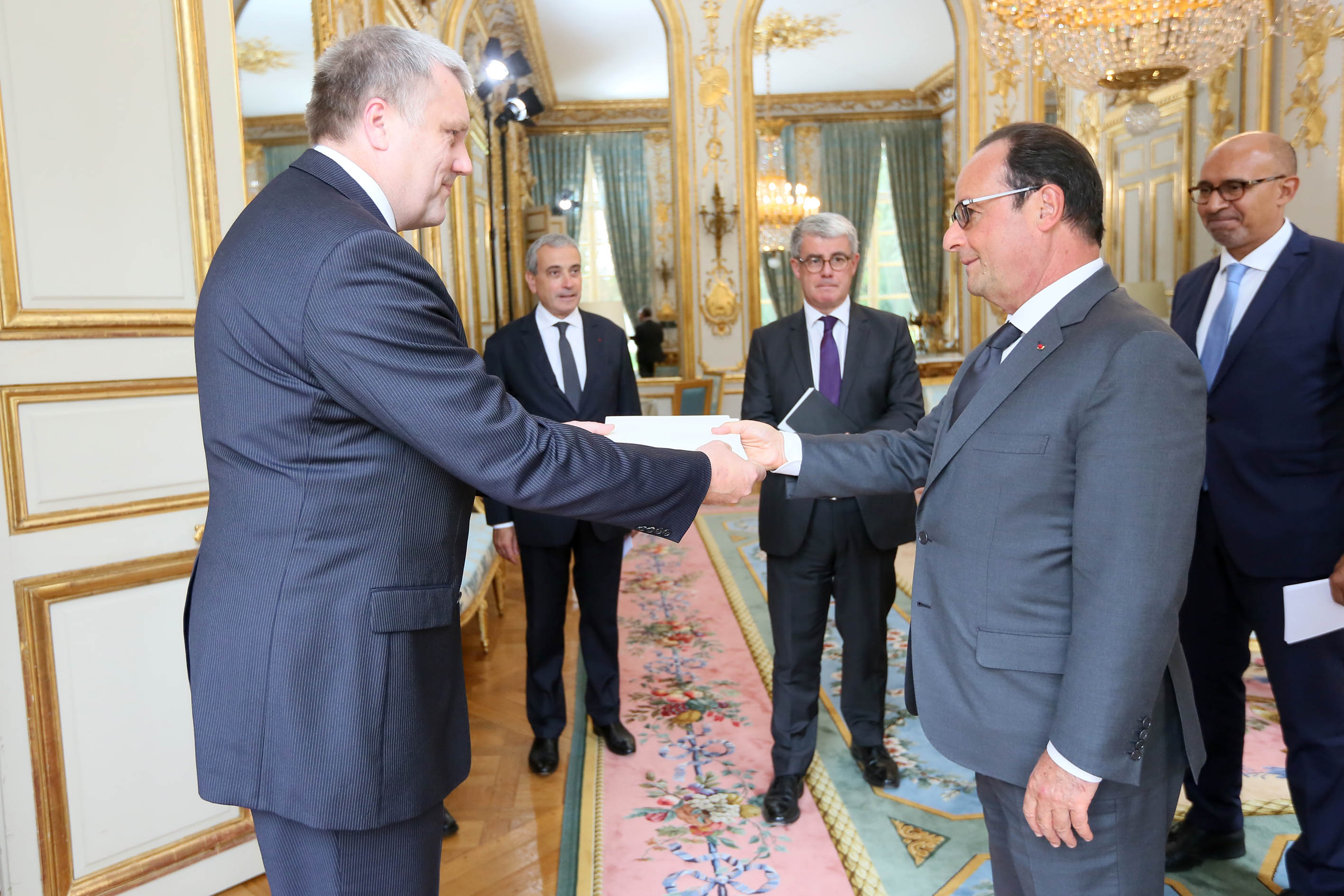 Photo: © Présidence de la République – L.Blevennec